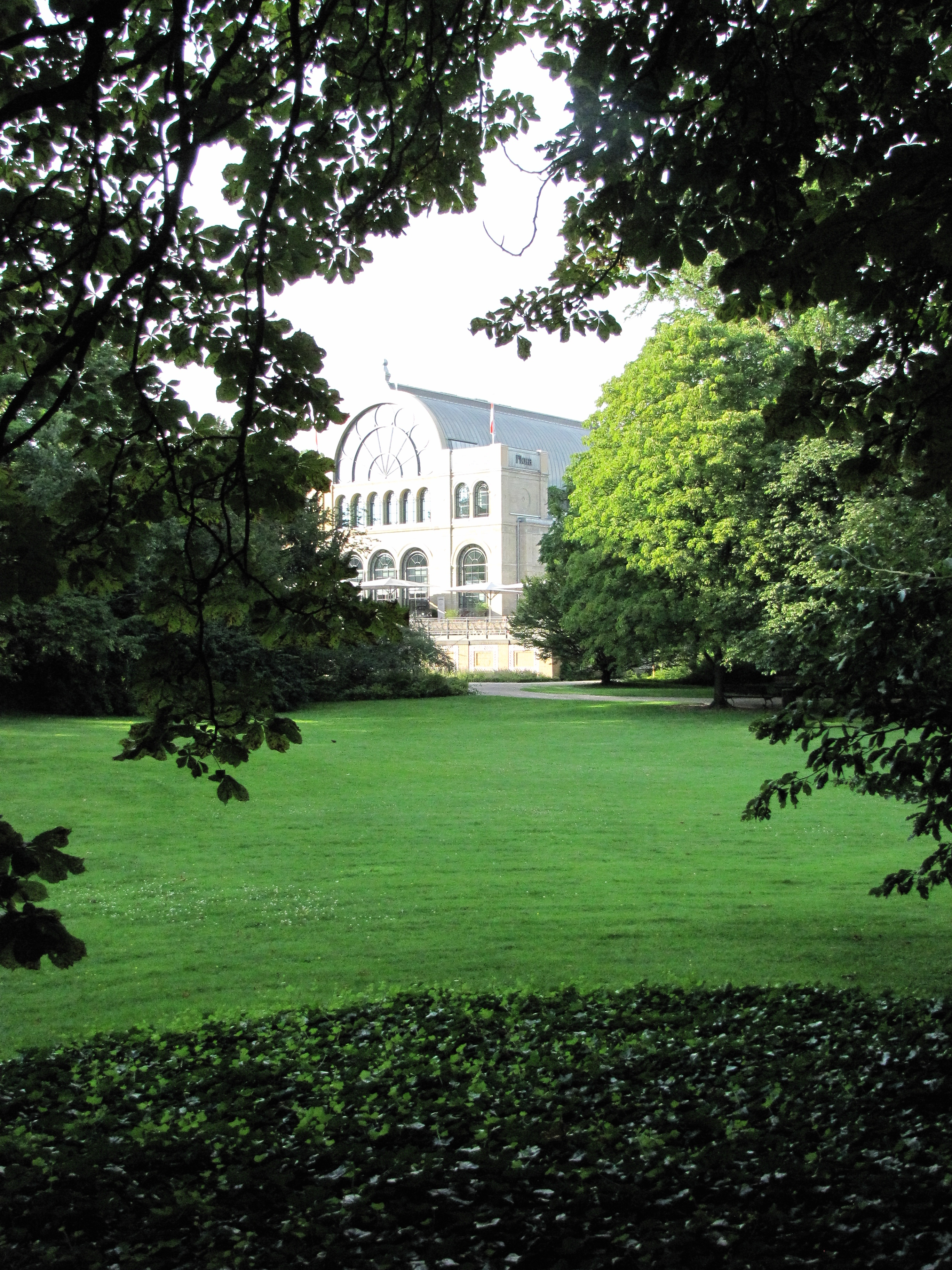 Englische Partie in der Flora (Köln) basierend auf Entwürfen von Peter Joseph Lenné aus dem Jahre 1862